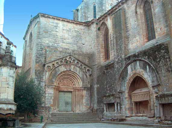 Vallbona puertas iglesia. La foto está realizada por AnTeMi y la cede a Wikipedia. Categoría:Monumentos (imagen)